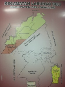 Kecematan Labuhan Deli